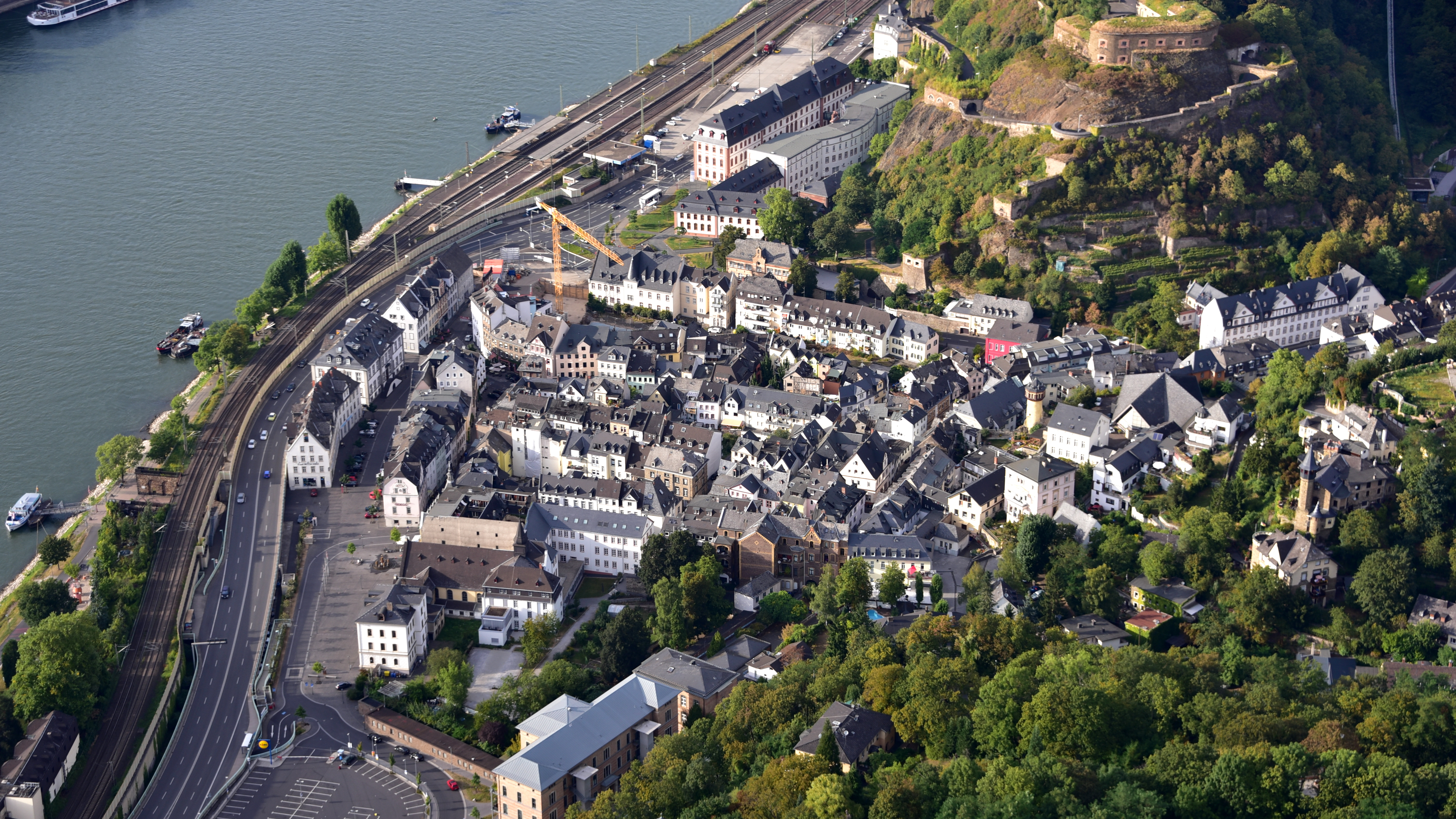 Ehrenbreitstein, Luftaufnahme (2016)